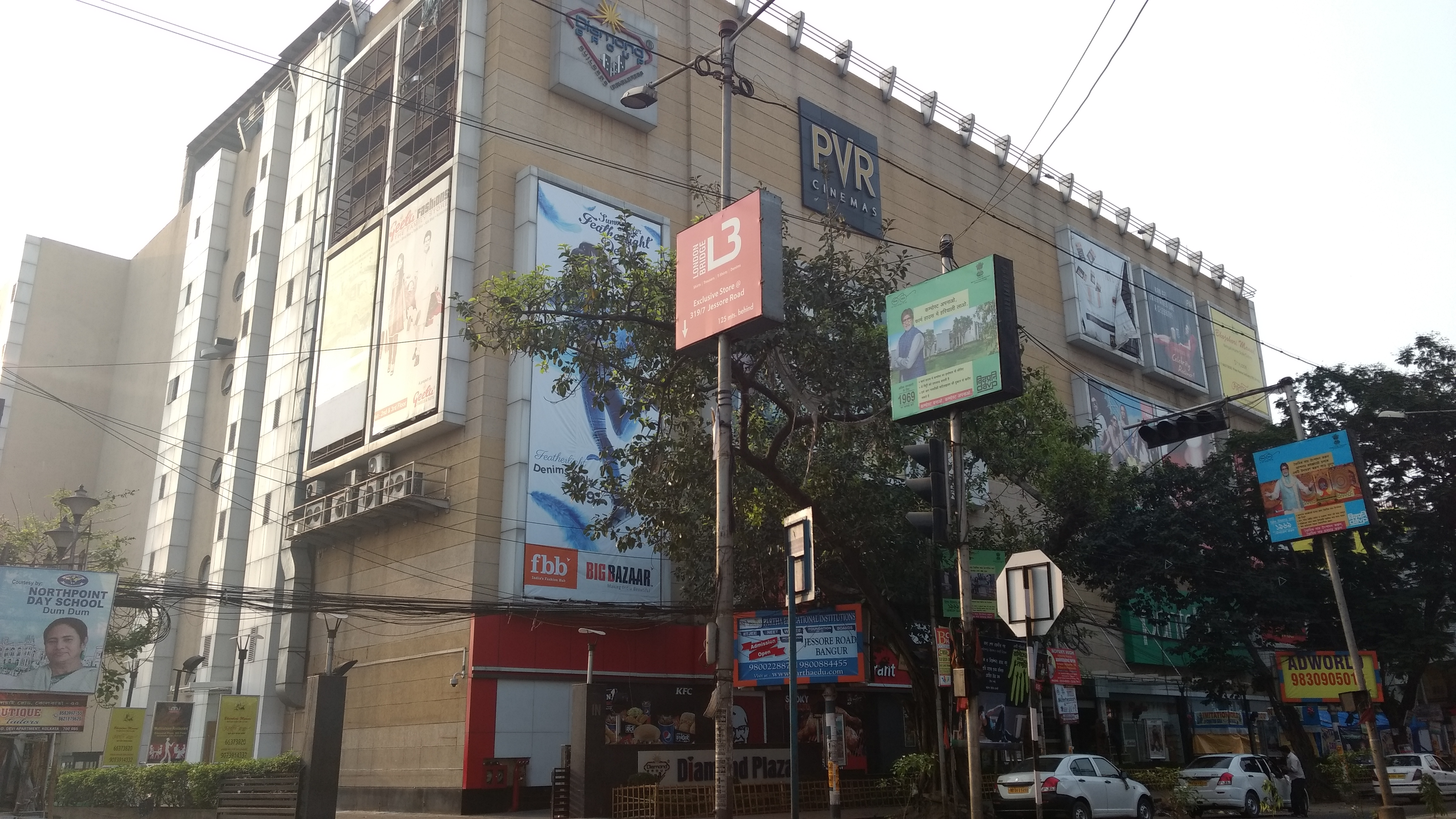 shopping mall